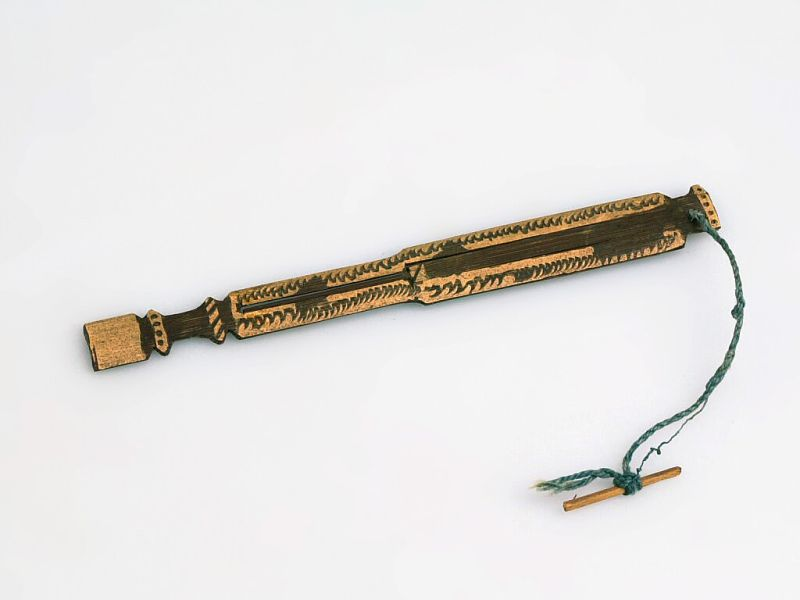 Tokkelinstrument. Mondharp van bamboe Unknown language: Genggong